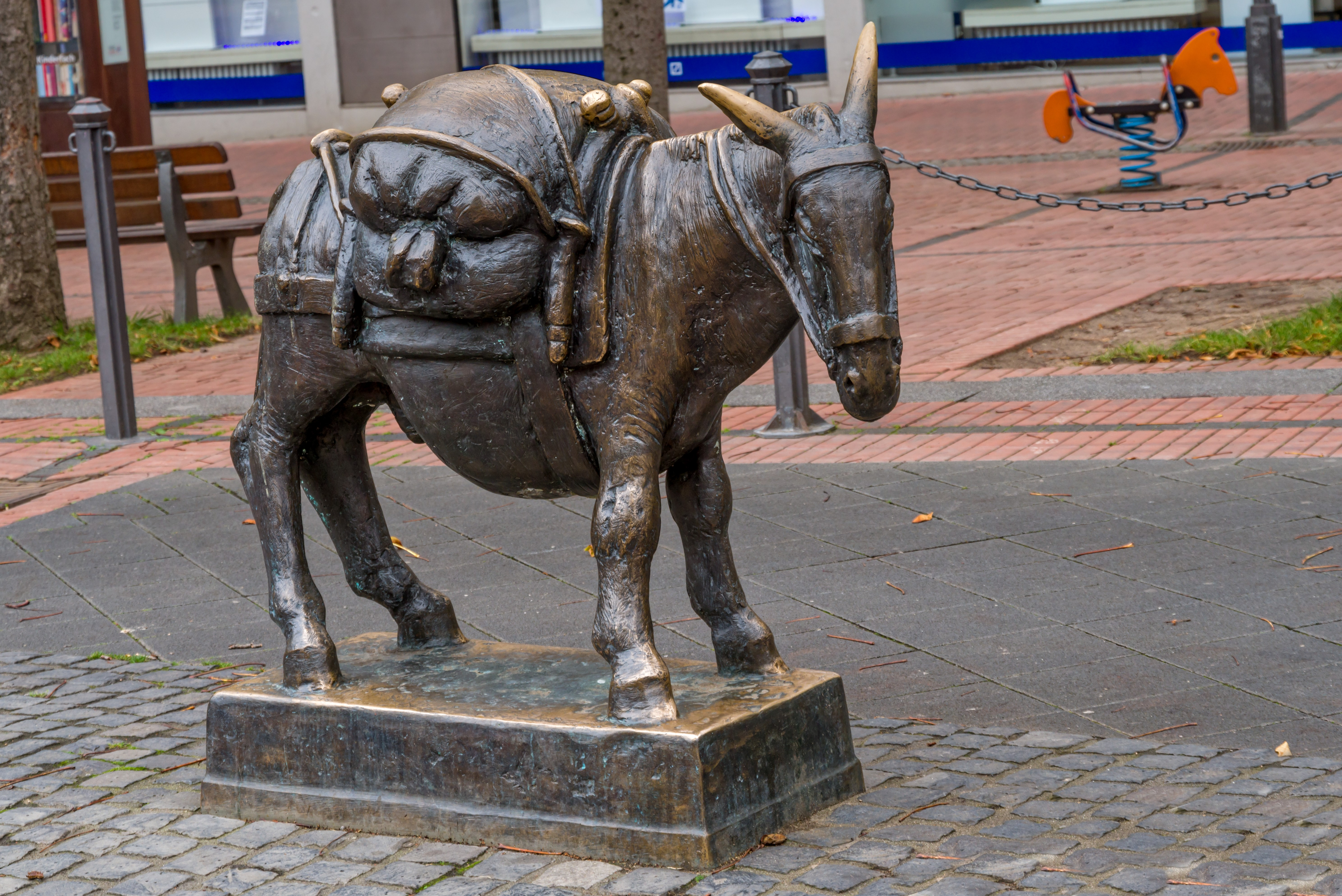 Duisdorfer Esel, Rochusstraße/Am Schickshof, Bonn-Duisdorf